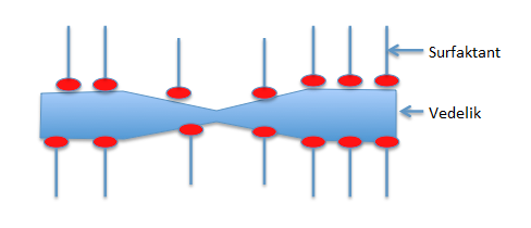 Marangoni Efekt kilel